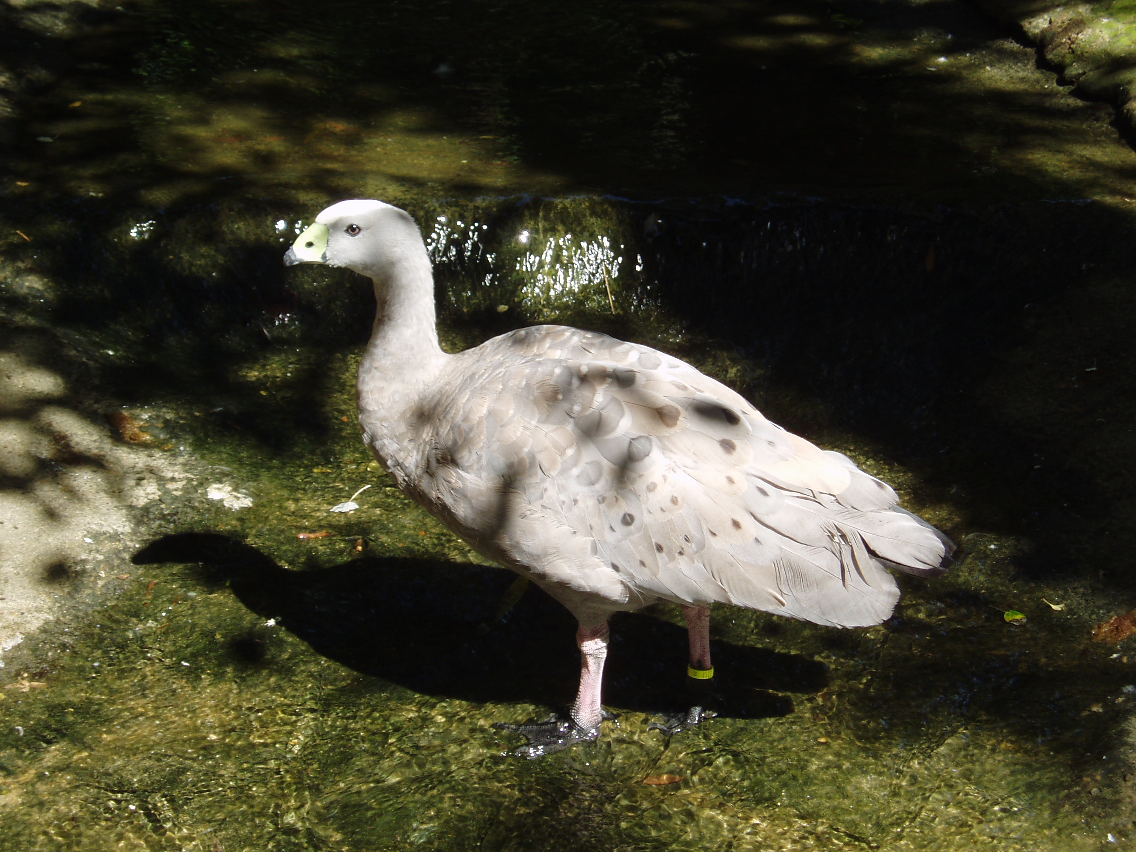 Ganso ceniciento (Cereopsis novaehollandiae) en el zoo de Jerez de la Frontera, España.